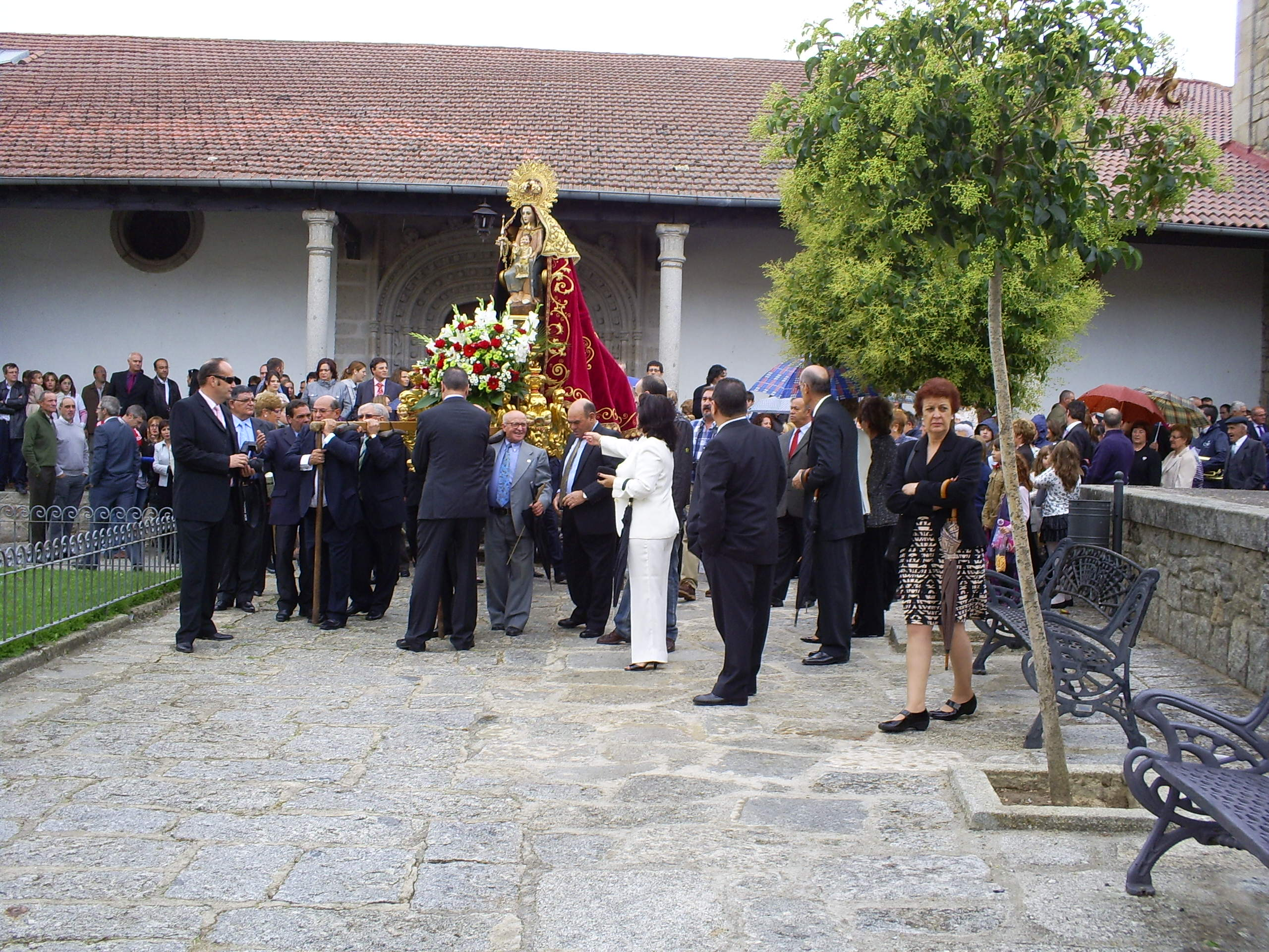 procesión en santibañez